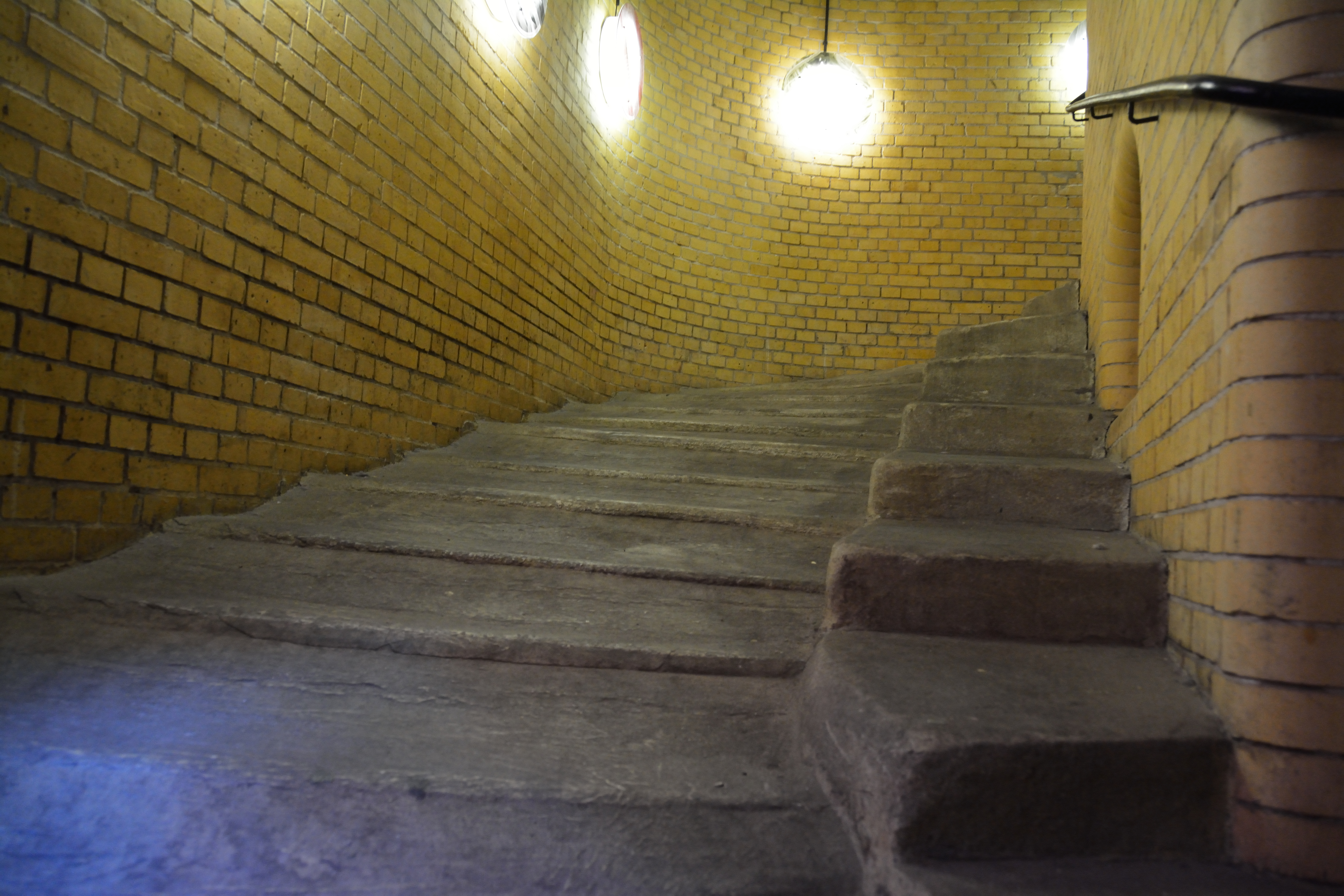 Impressionen der Pferdetreppe im Technikmuseum Berlin